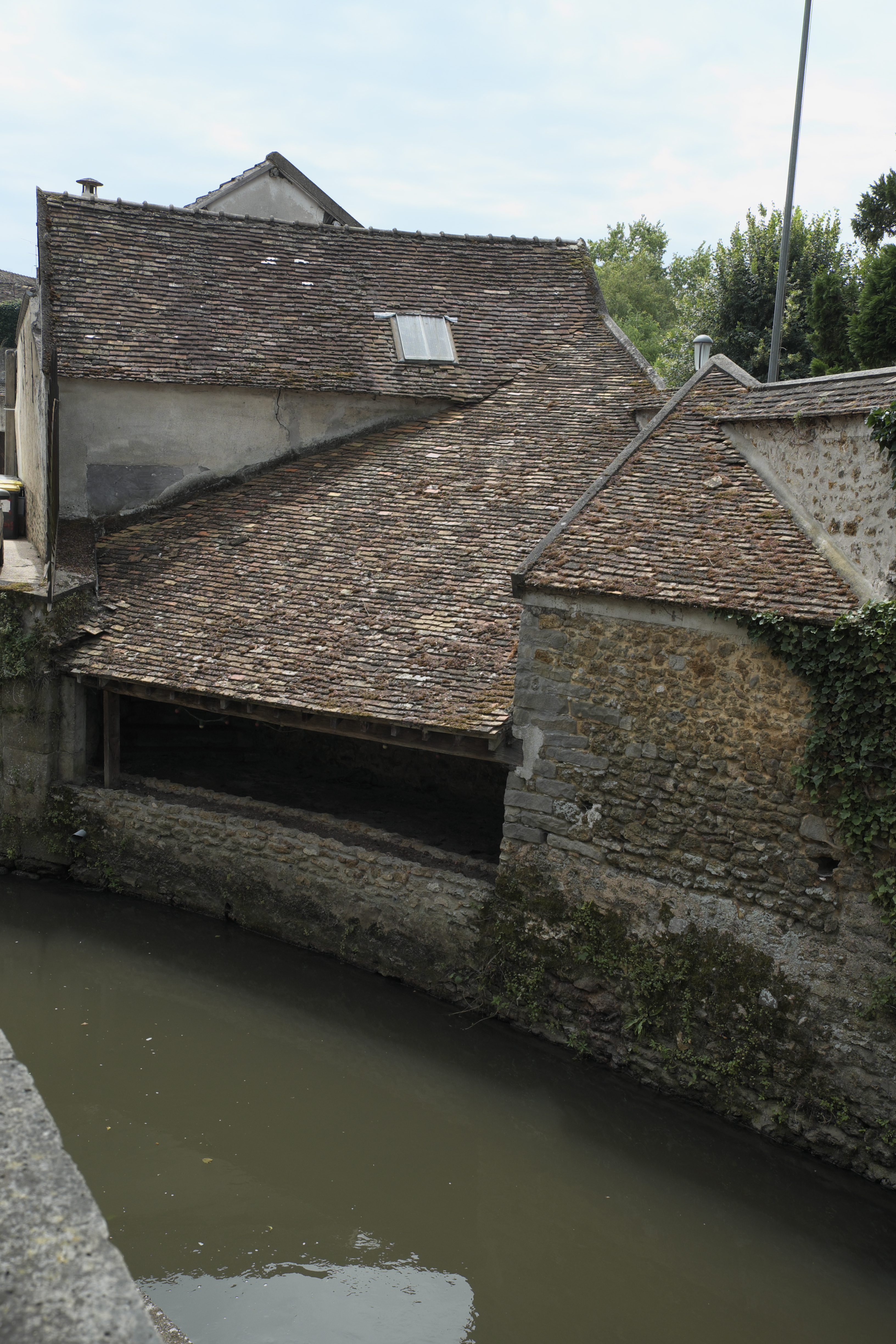 Waschhaus (lavoir) in Arpajon im Département Essonne (Île-de-France/Frankreich)